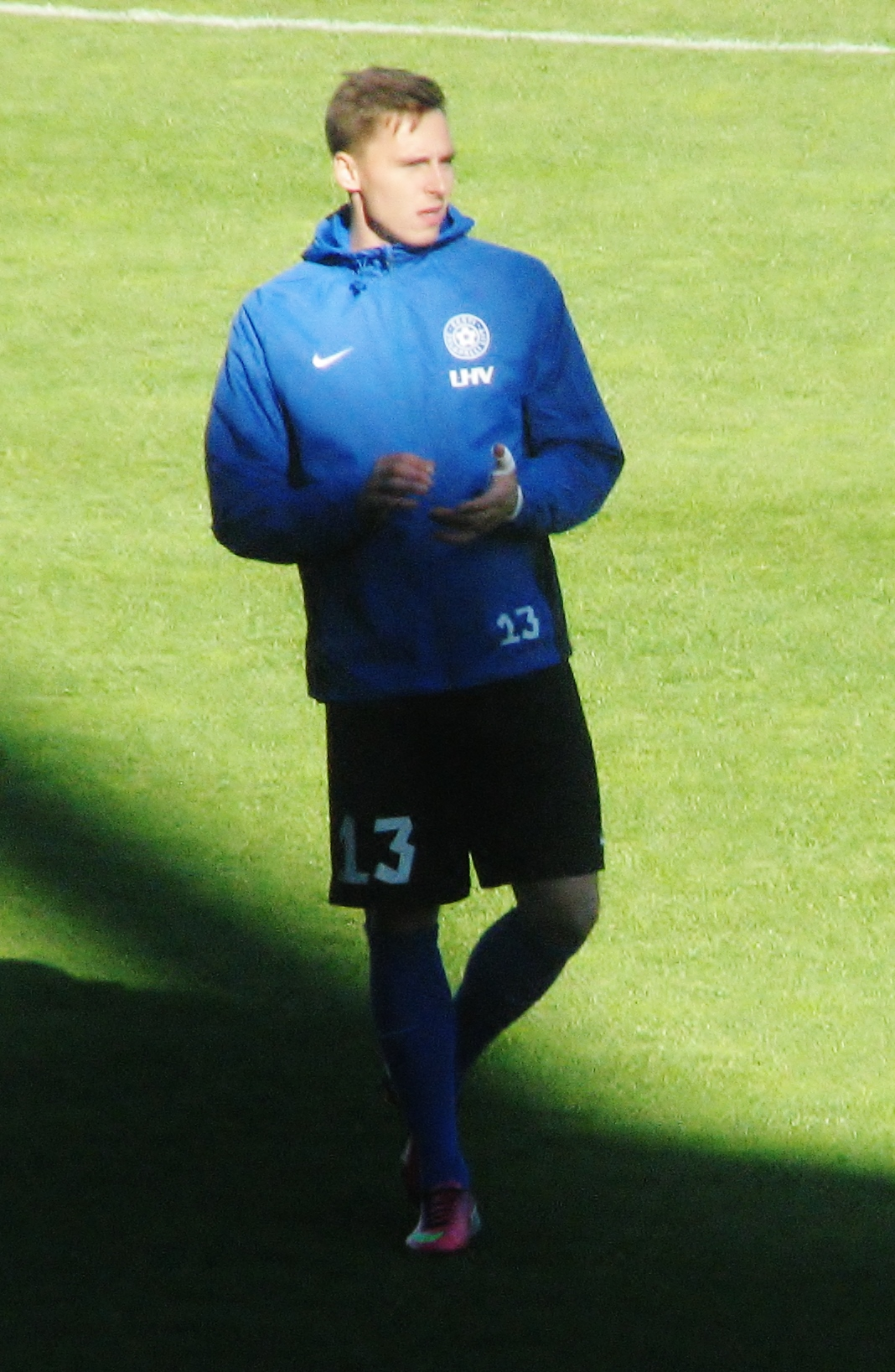 Siim Luts Eesti-Soome maavõistlusel Veritase staadionil